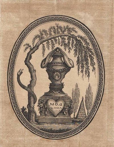 A cada banda de l'urna funerària apareixen representats els perfils de Lluís XVI i de Maria Antonieta. Dissimulats pel tronc del salze ploraner, trobem els perfils dels seus fills.